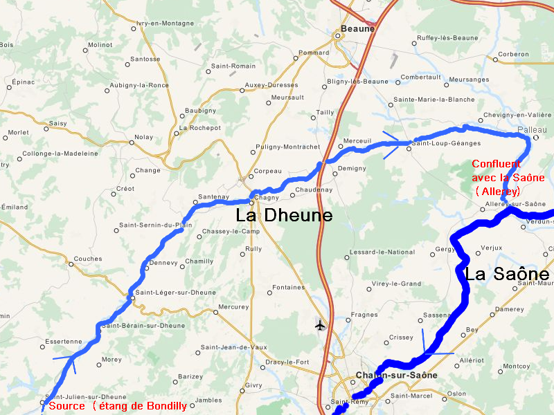 Cours de la rivière Dheune affluent de la Saône en Bourgogne (France)